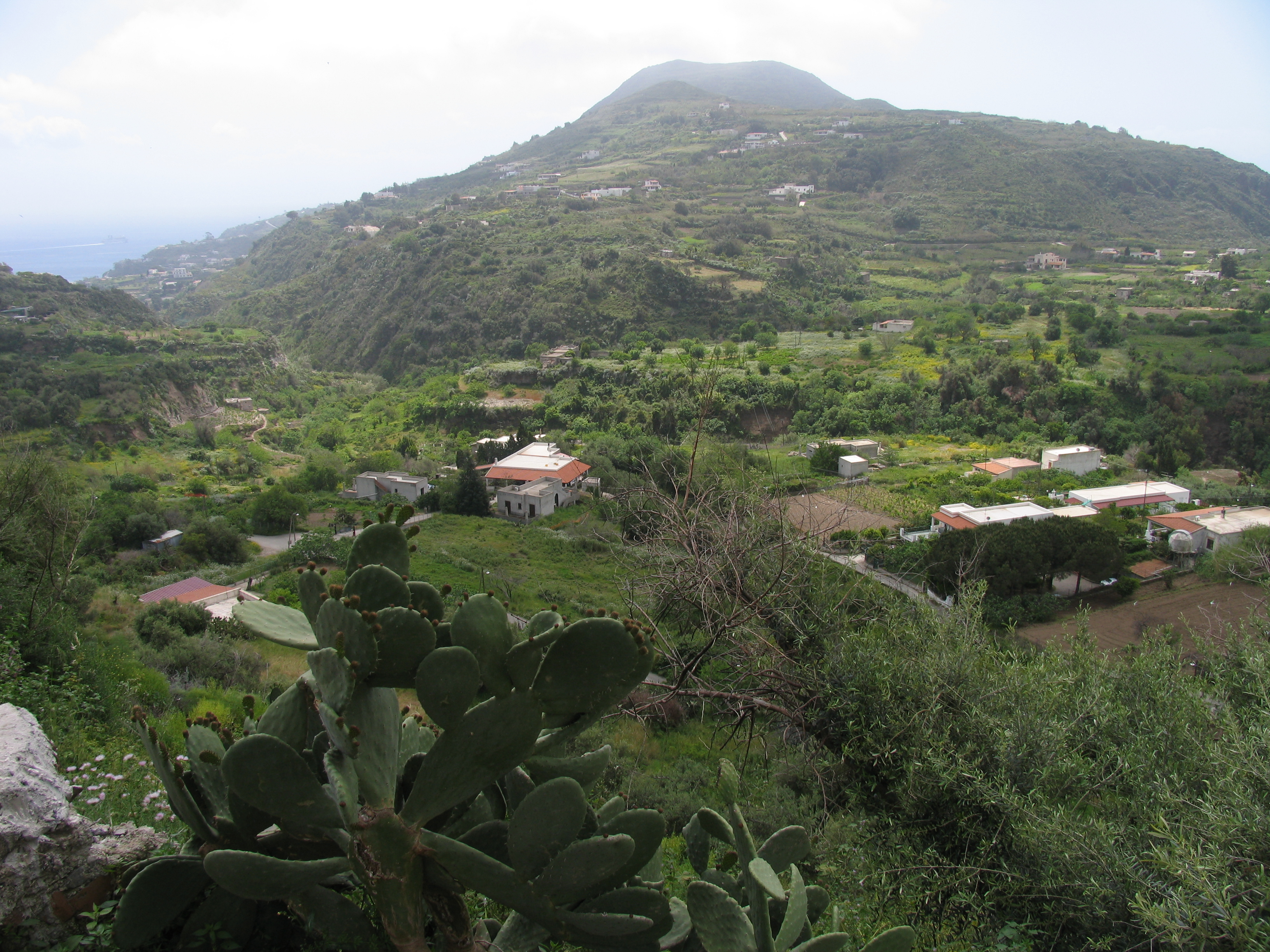 La Piana dei Greci nell'isola di Lipari